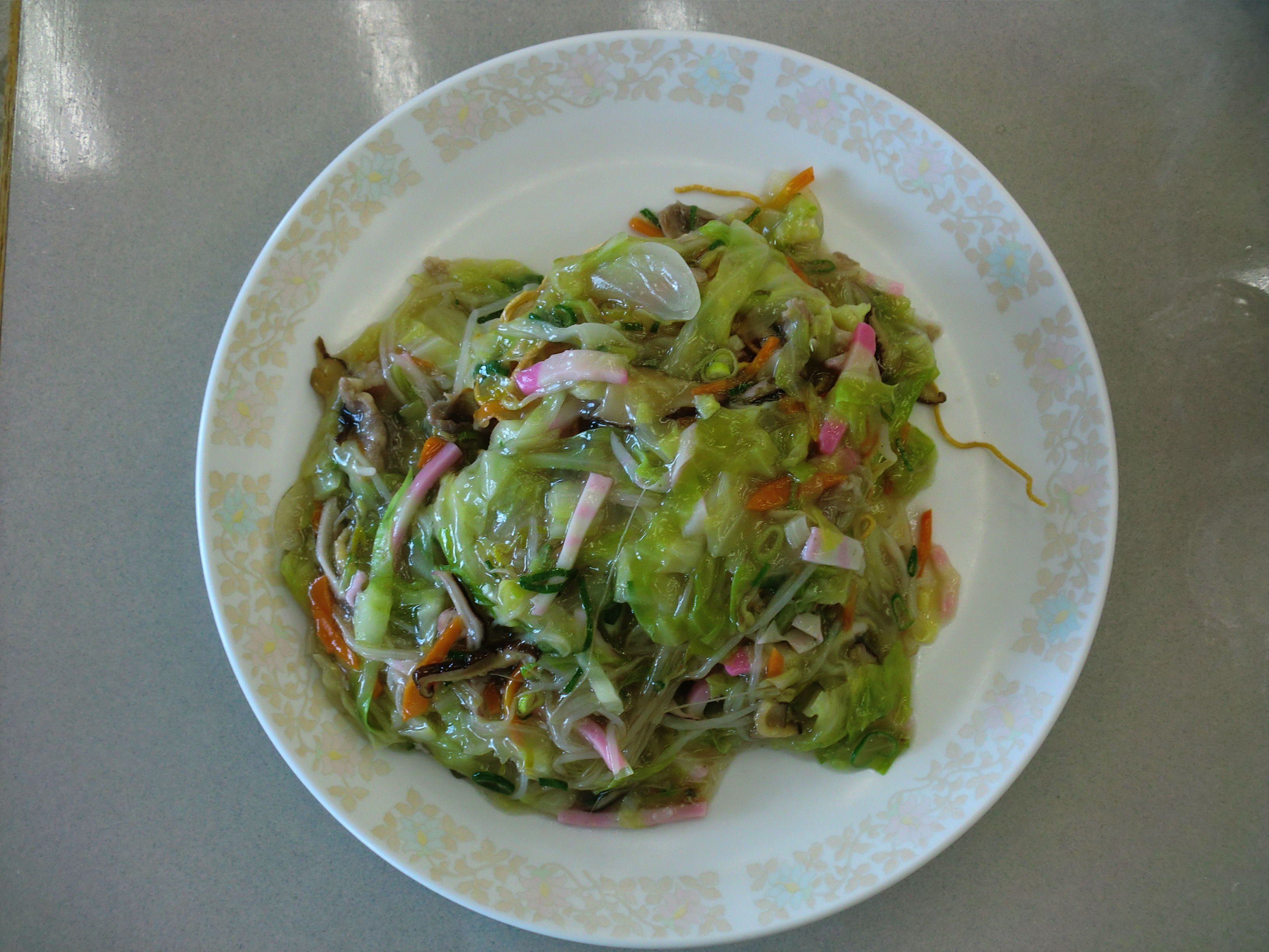 山形屋ファミリーレストランの焼きそば